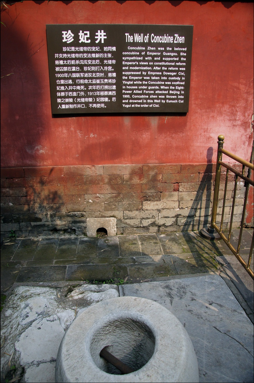 中文（中国大陆）: 故宫博物院-珍妃井